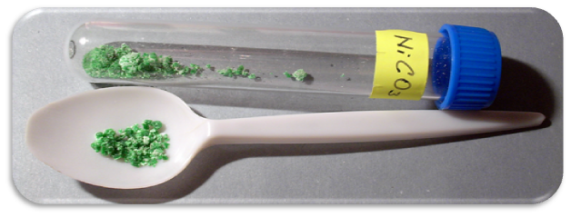 Uhličitan nikelnatý - NiCO3